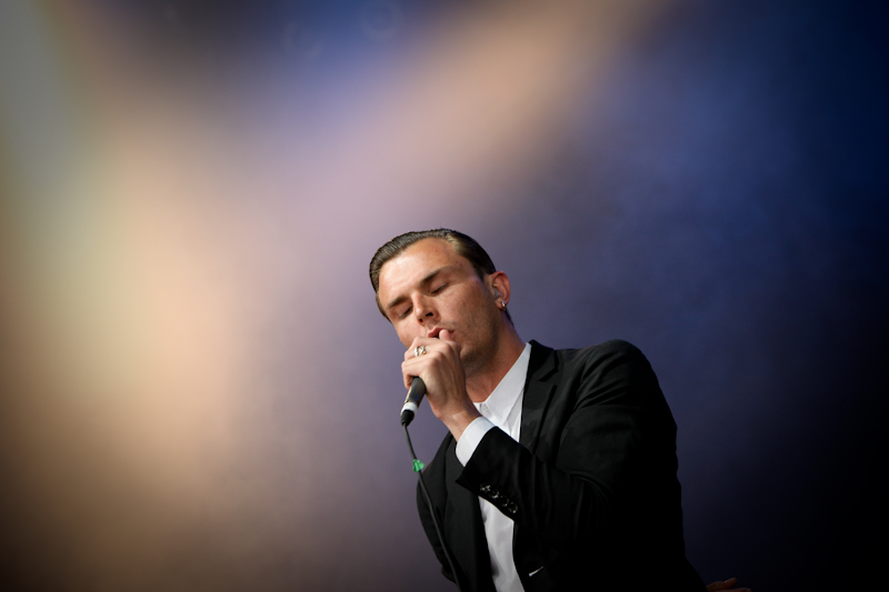 Openair St. Gallen 2010